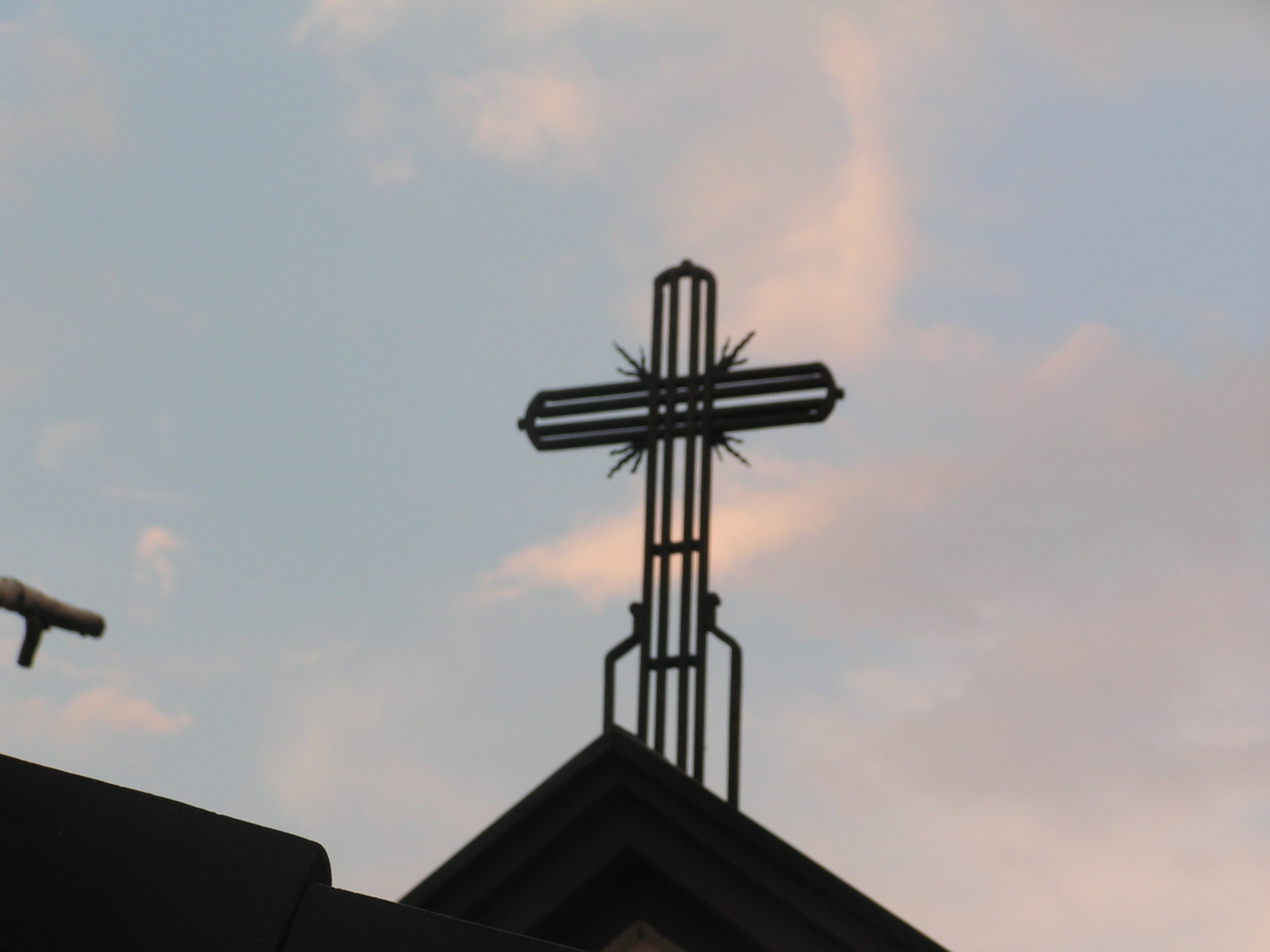 szczegół